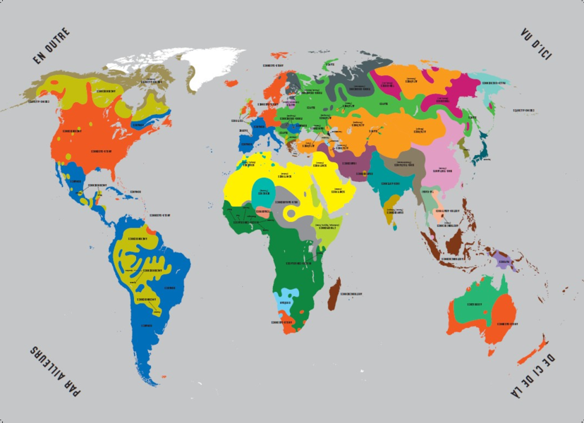 Carte créée par David Poullard pour illustrer une plaquette de présentation lors de l'inauguration de la bibliothèque de la BULAC (Paris, 13e).